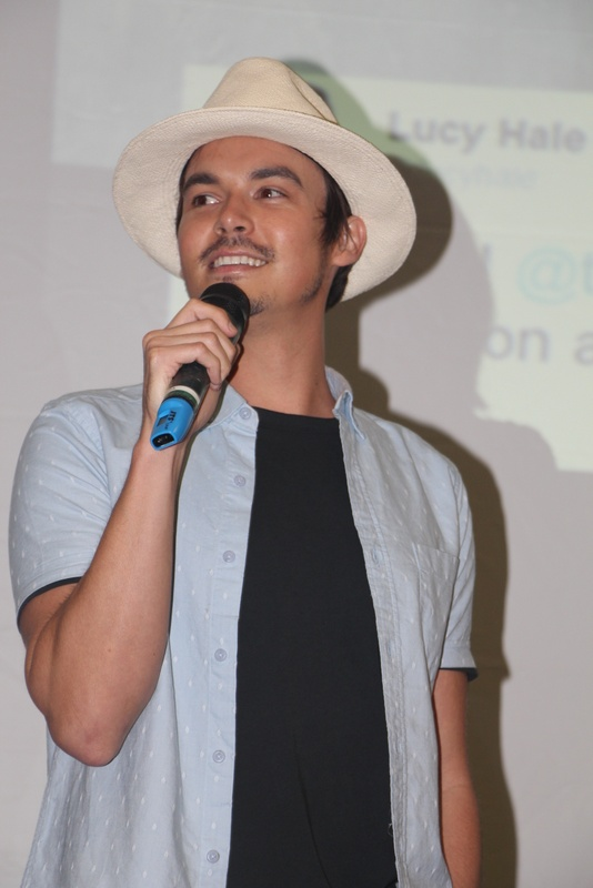 Tyler Blackburn-002